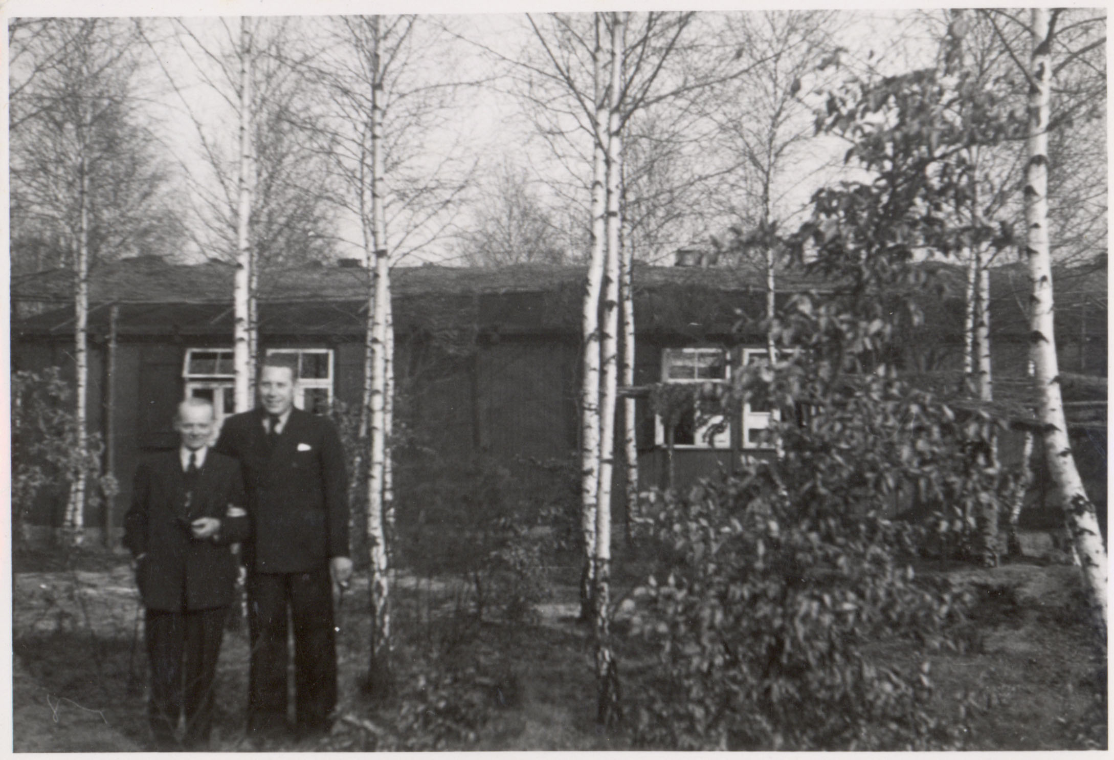 Provisorische Unterkunft für Bombenopfer in Dessau